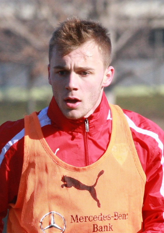 Alexandru Maxim beim VfB-Training. Aufgenommen von